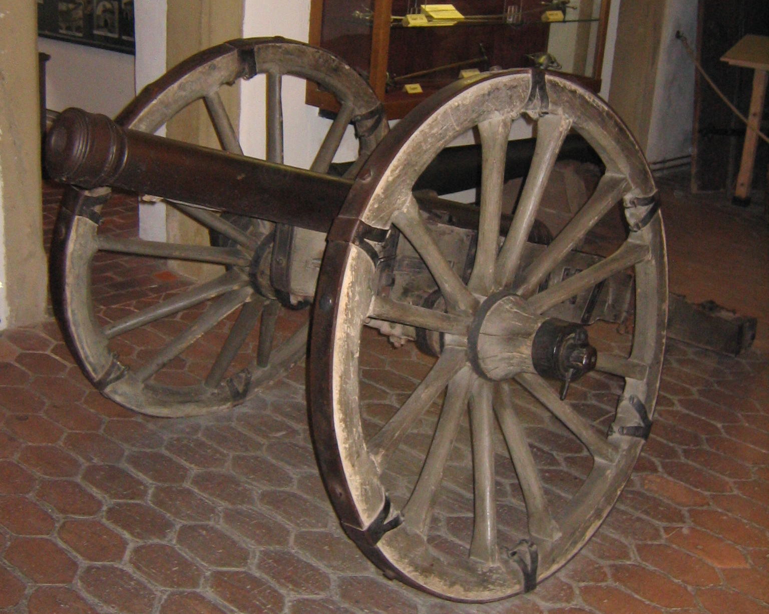 aufgenommen im Historiengewölbe und Staatsverlies von Rothenburg ob der Tauber, Deutschland